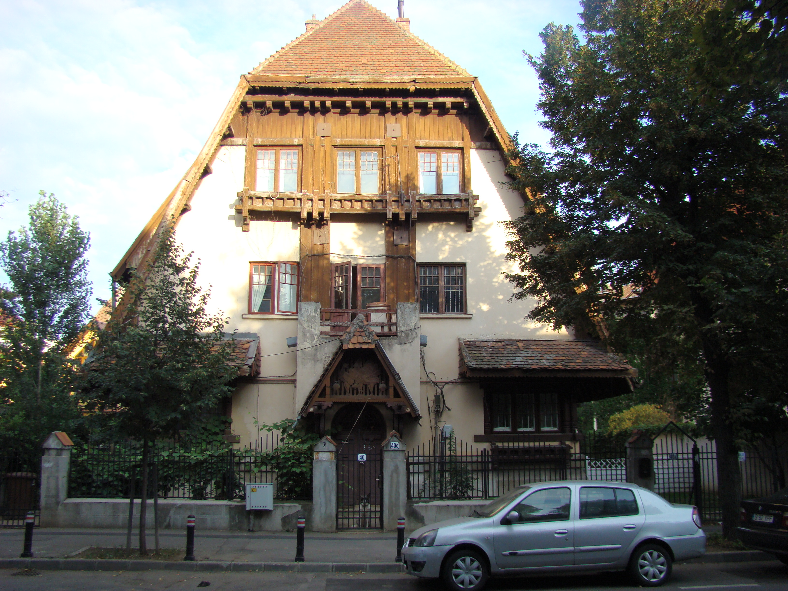 Clădire monument istoric, str. Paris, nr. 40A